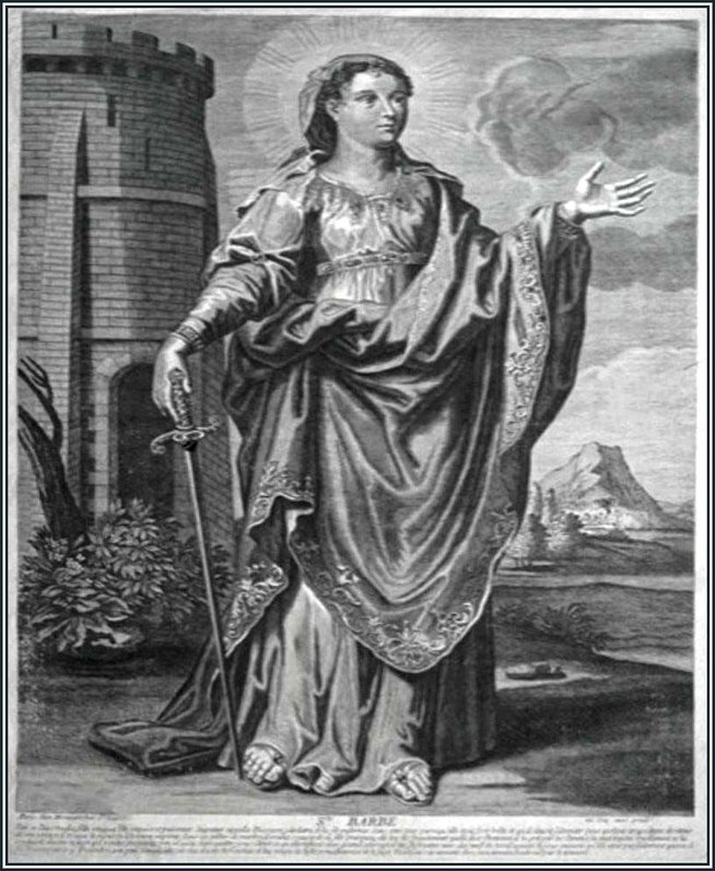 Henri Bonnart, Sainte Barbara, 1690.